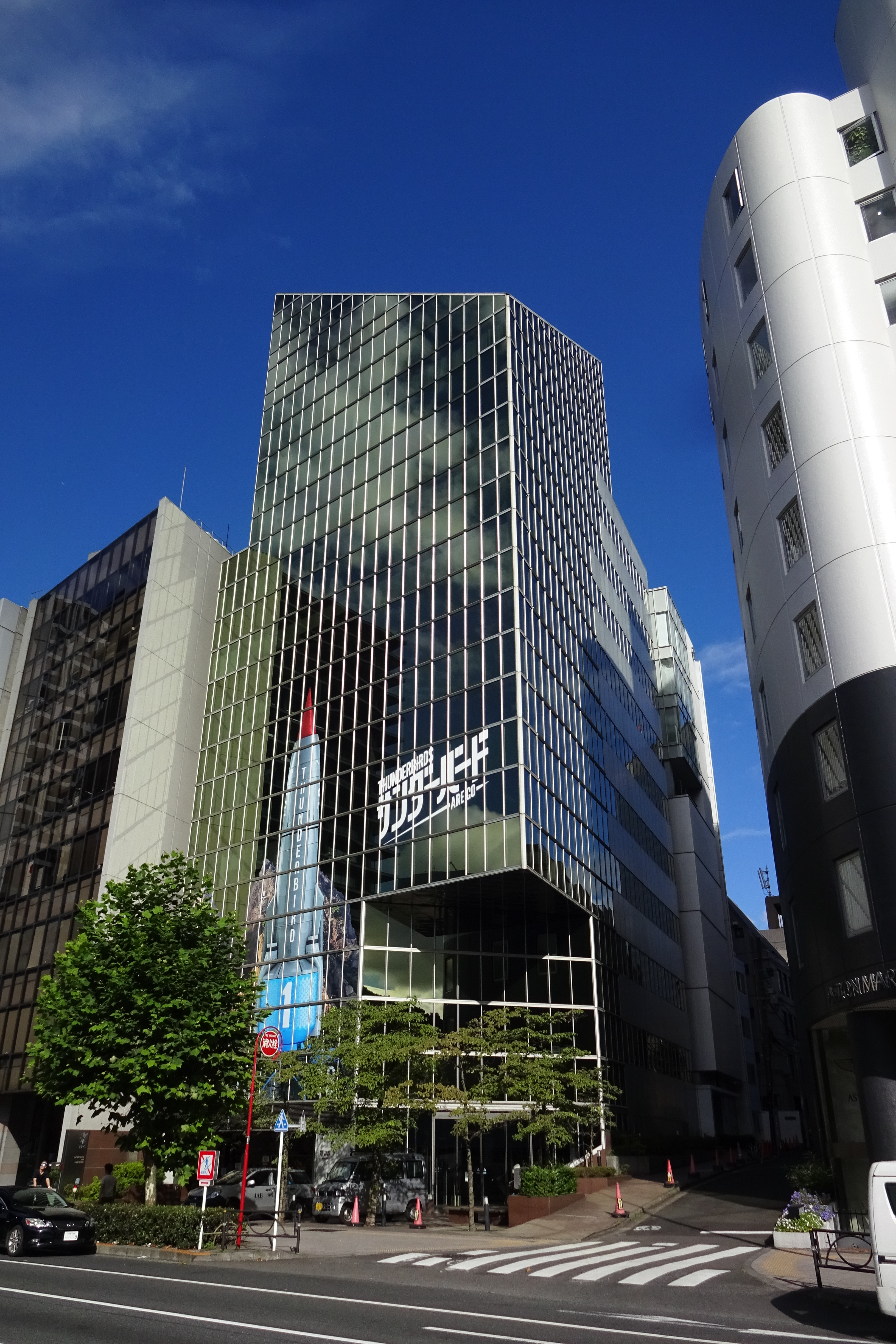 東北新社の本社ビル